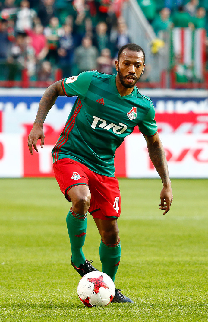 «Локомотив» - «Рубин»